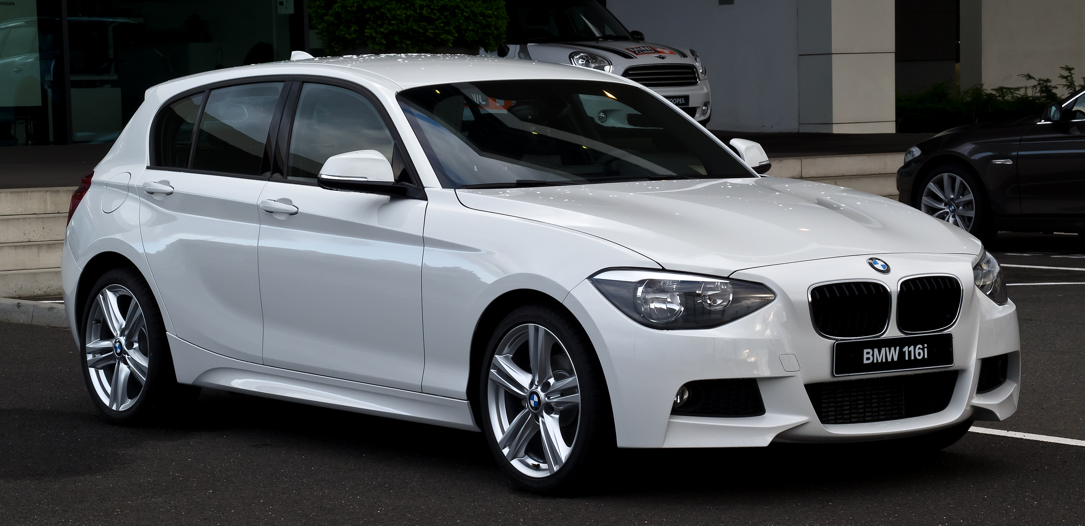 BMW 116i M-Sportpaket (F20)